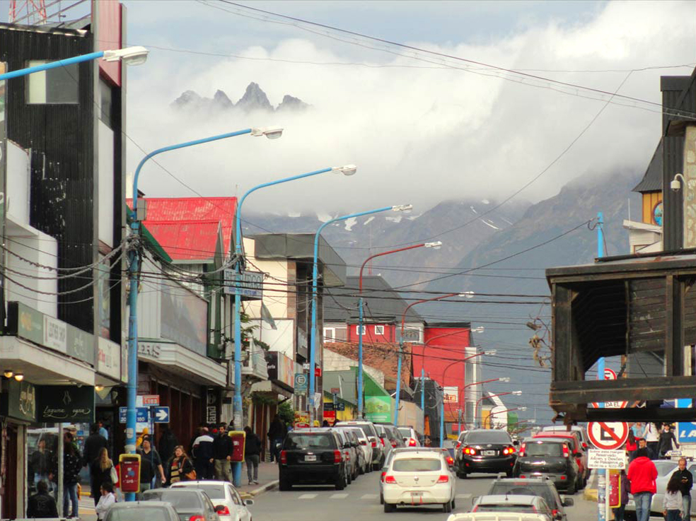 Ushuaia